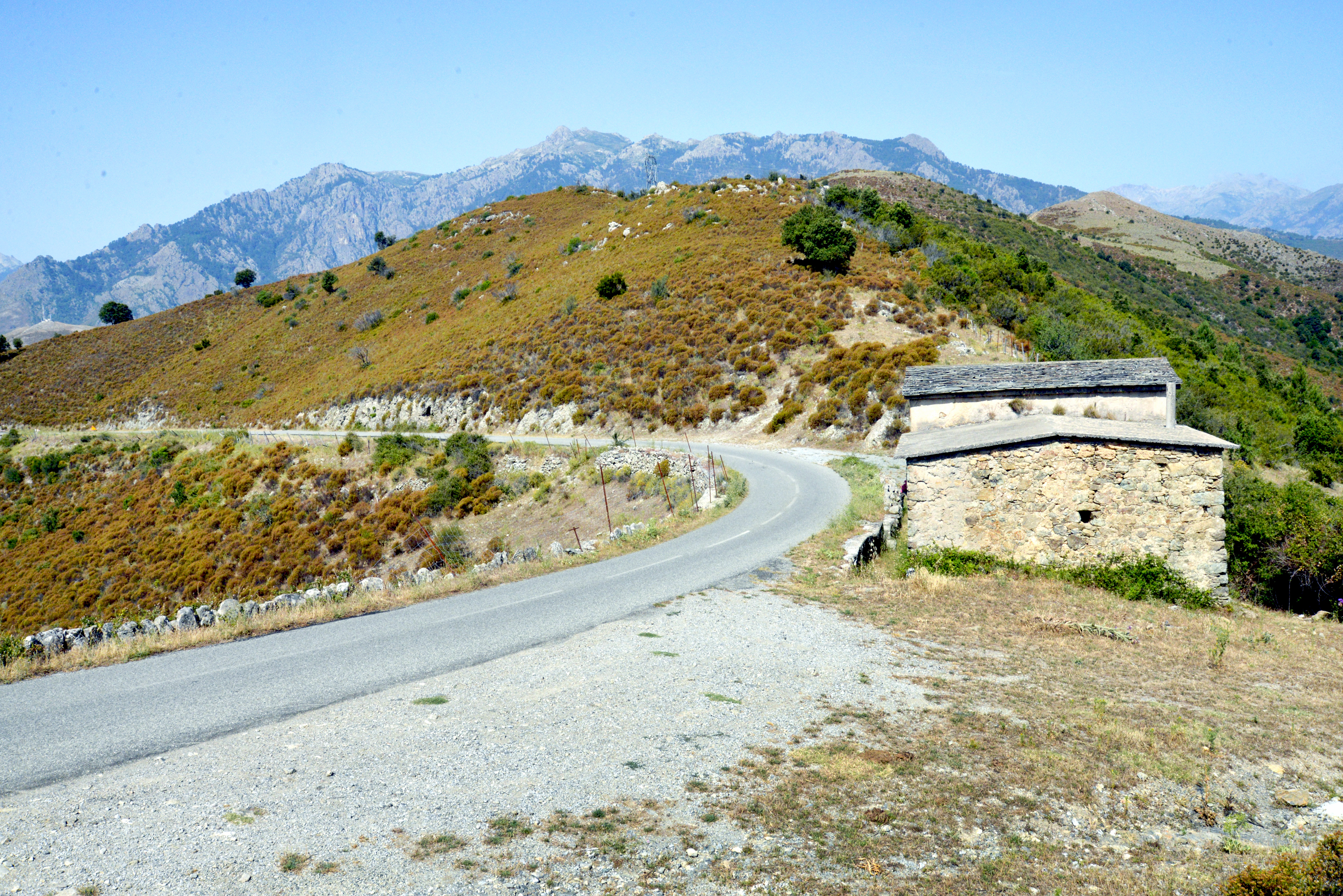 Tralonca, Centre Corse - Le col San Roccu du nom de la chapelle s'y trouvant, en bordure de la route D41